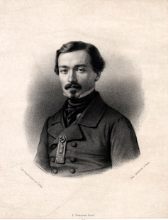 Armand Fresneau (1823-1900)